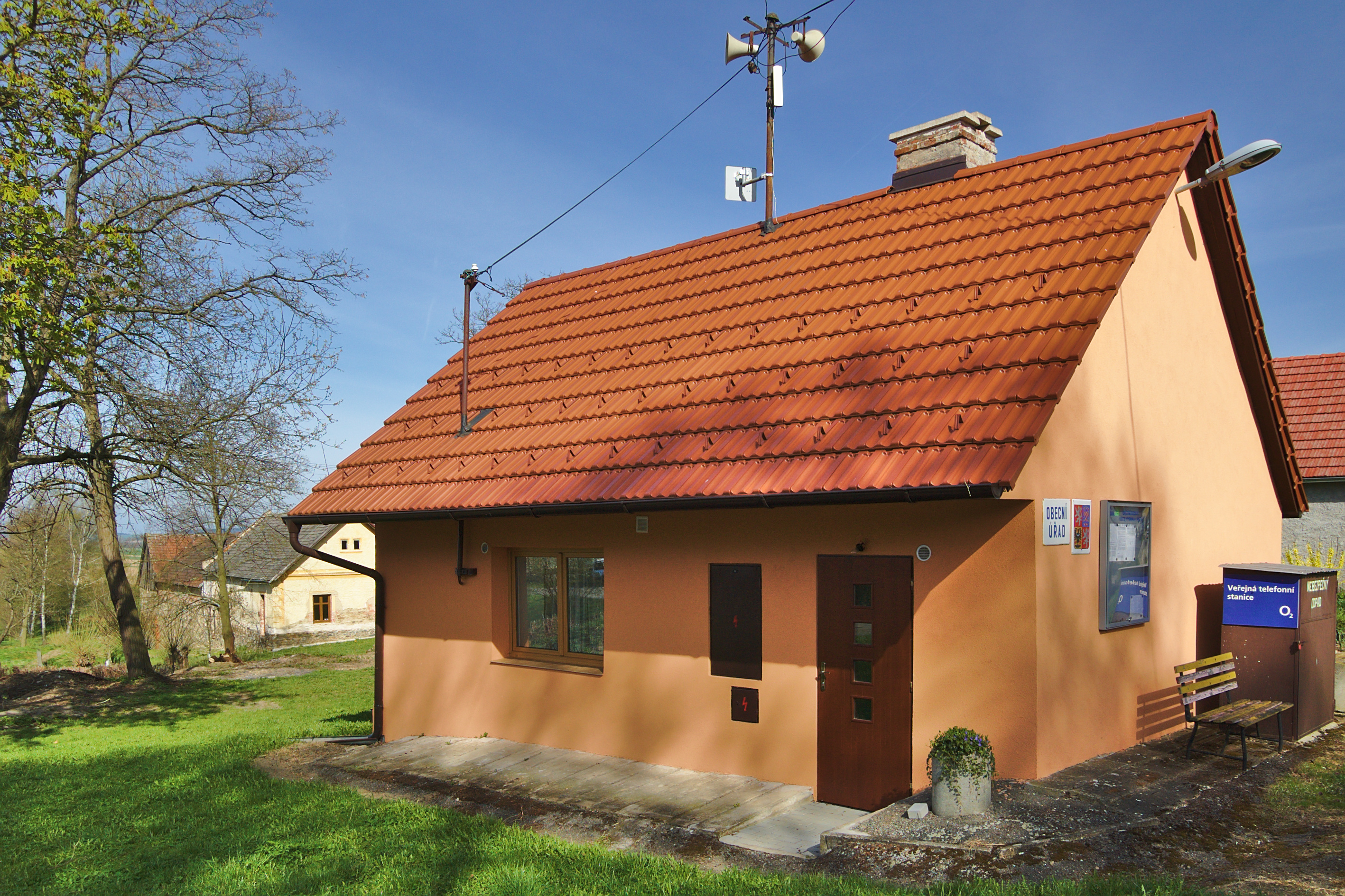 Obecní úřad, Vysoká Lhota, okres Pelhřimov Project: Fotíme Česko